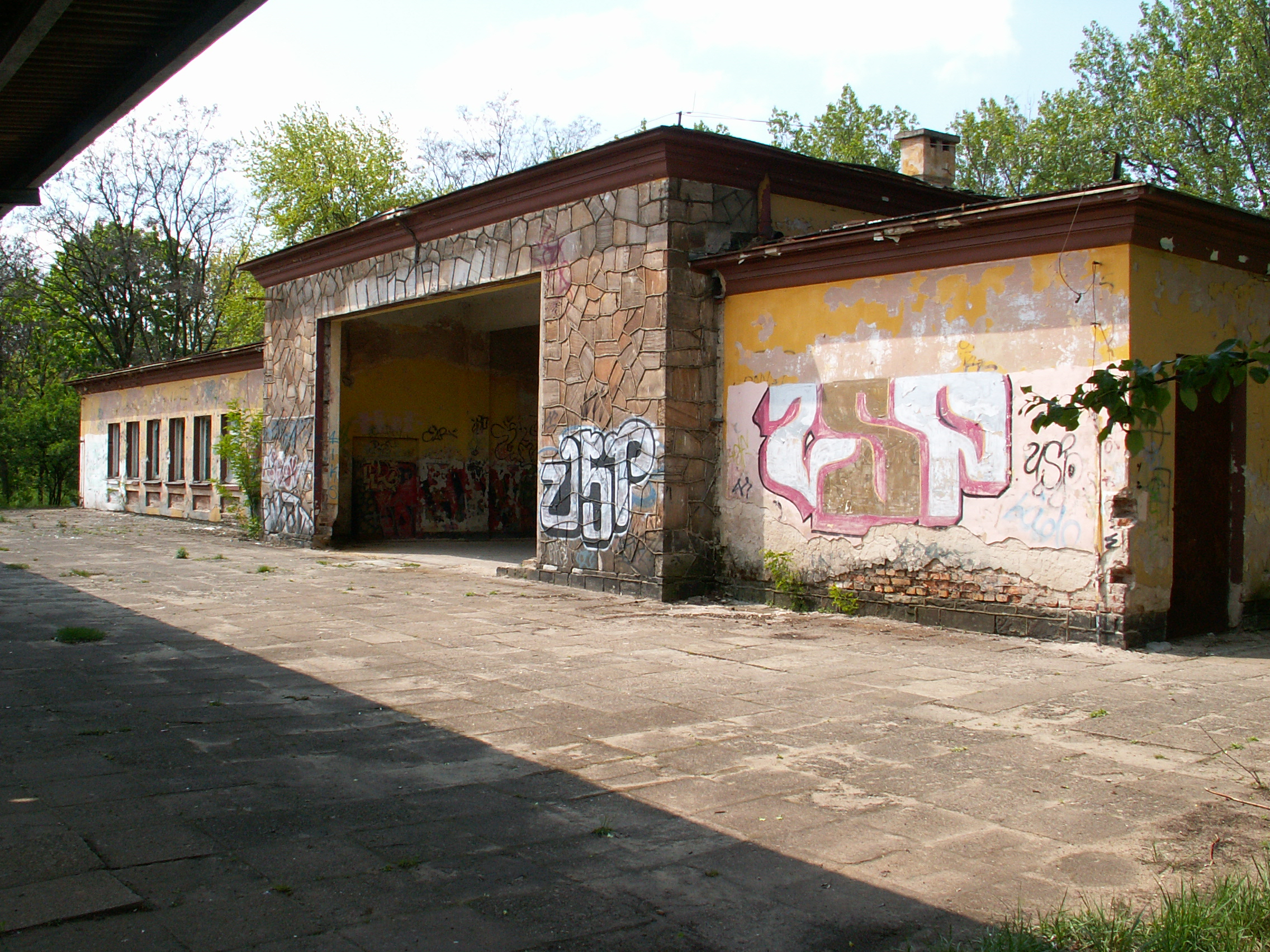 Skarżysko Zachodnie - stacja PKP.